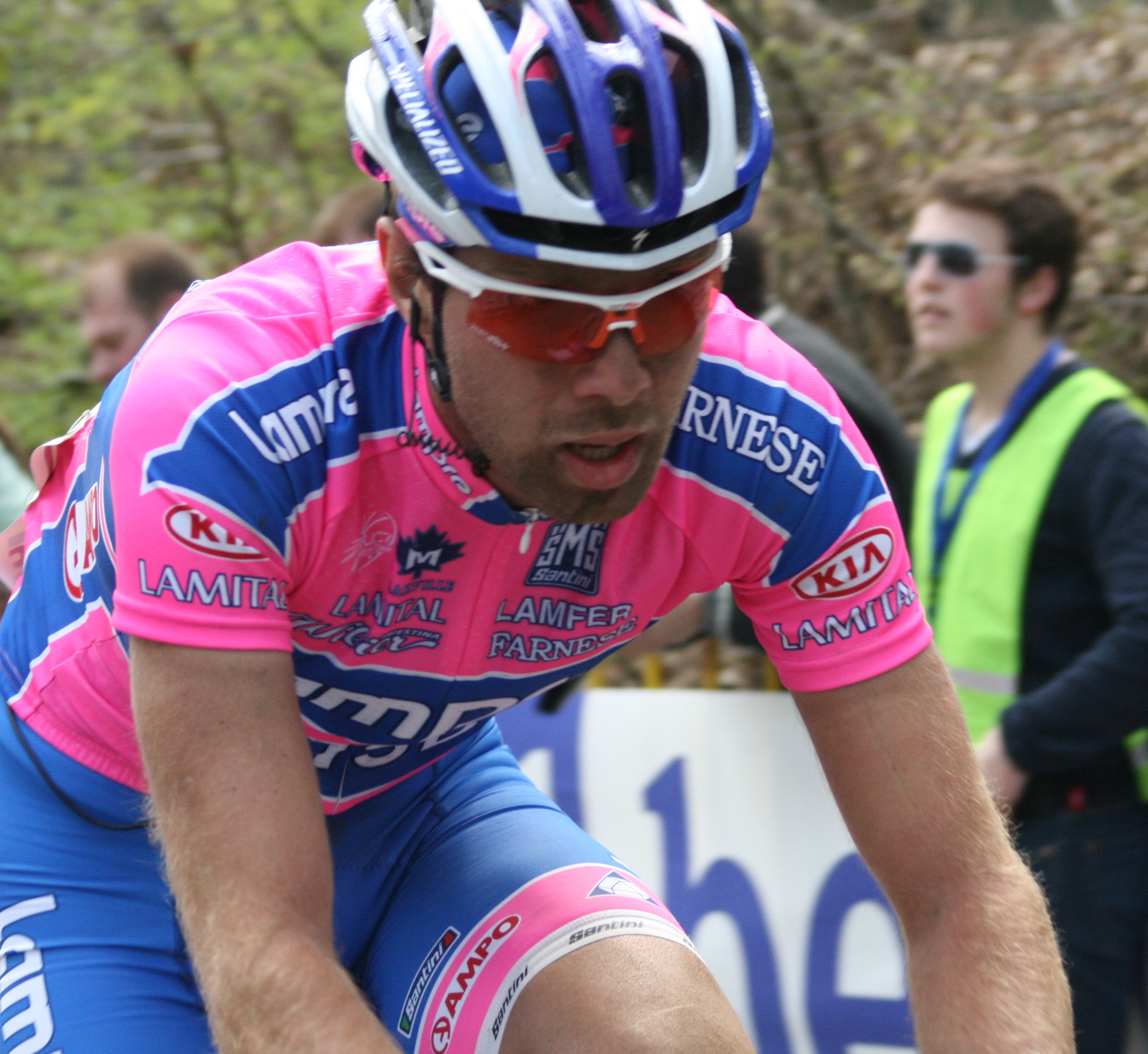 Gent-Wevelgem 2011, Kemmelberg